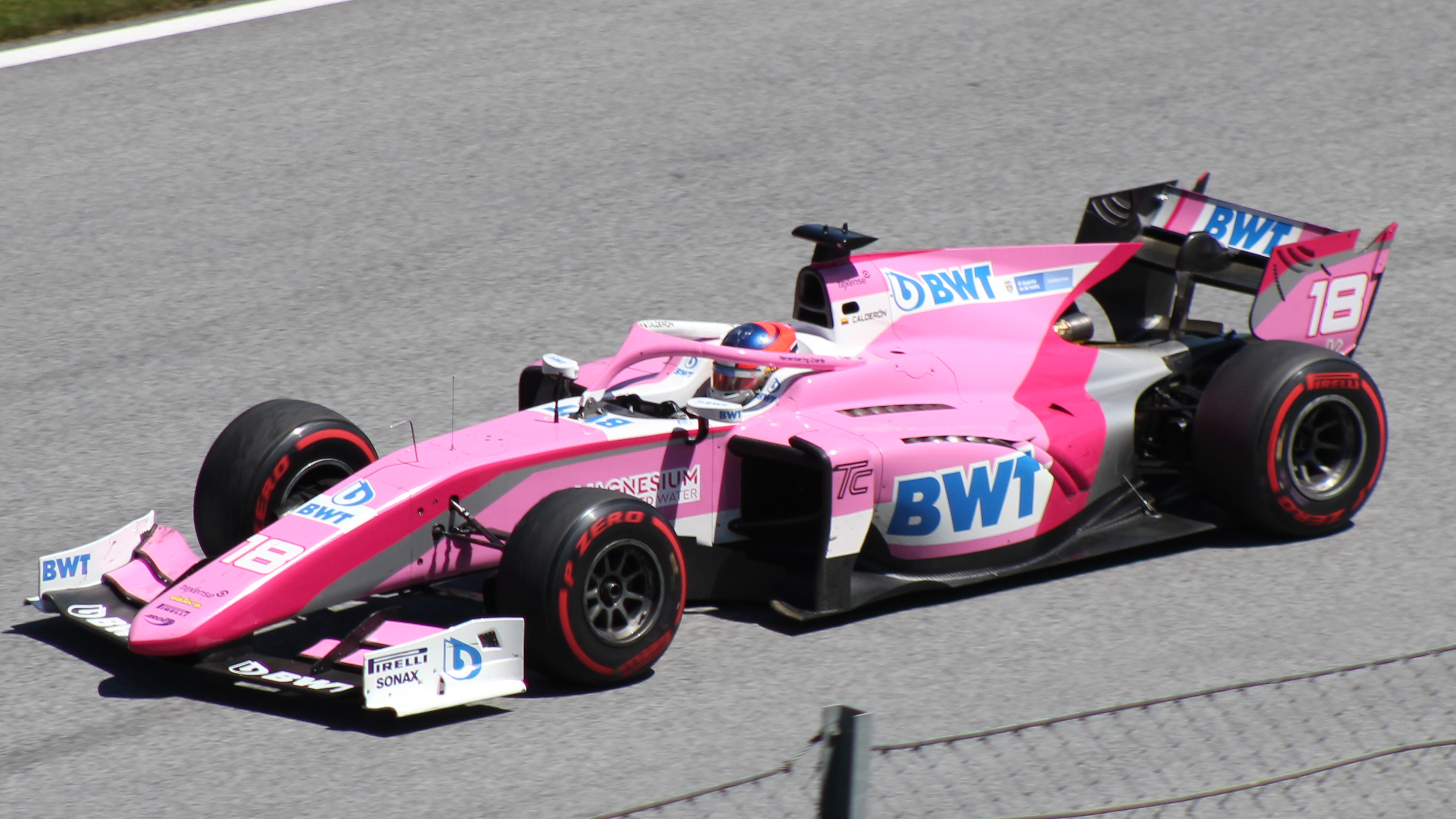 Calderon beim Rennwochenende in Österreich 2019